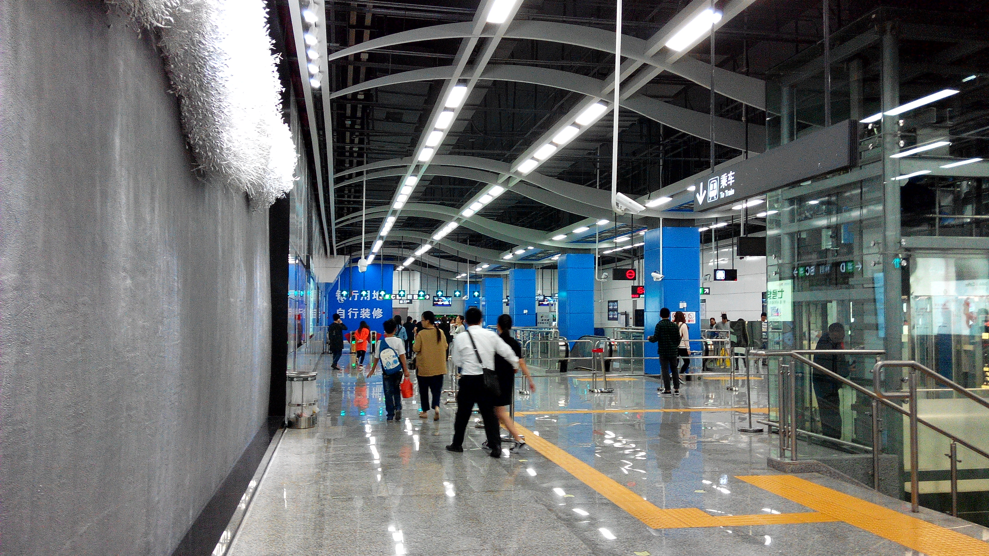 深圳地铁9号线 下沙站站厅